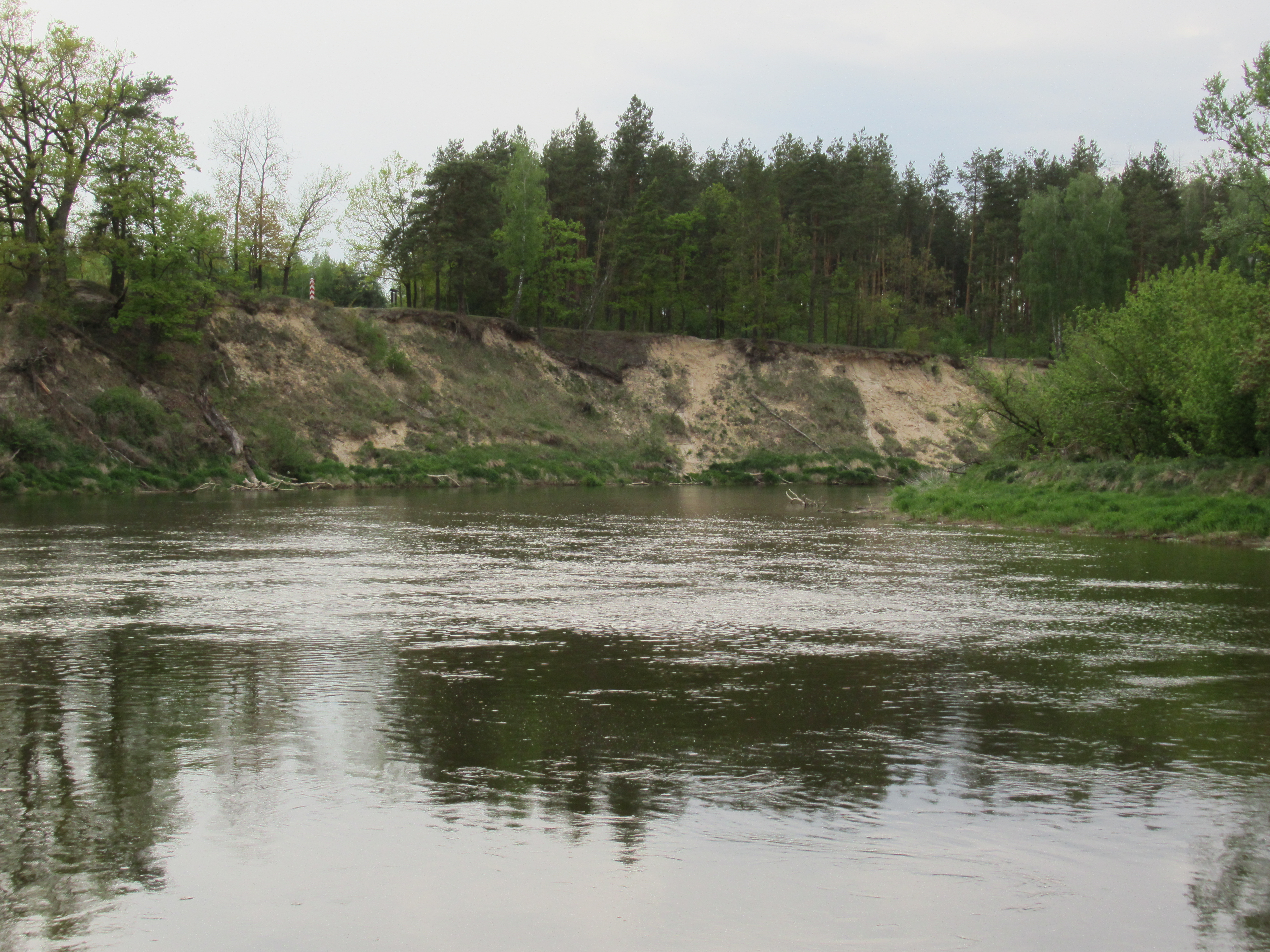 Rezerwat „Szwajcaria Podlaska” (pow. bialski, woj. lubelskie, Polska).